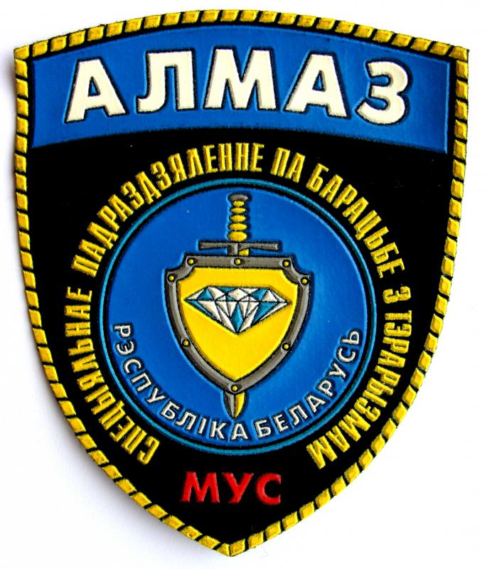 Шеврон бойца "алмаза"